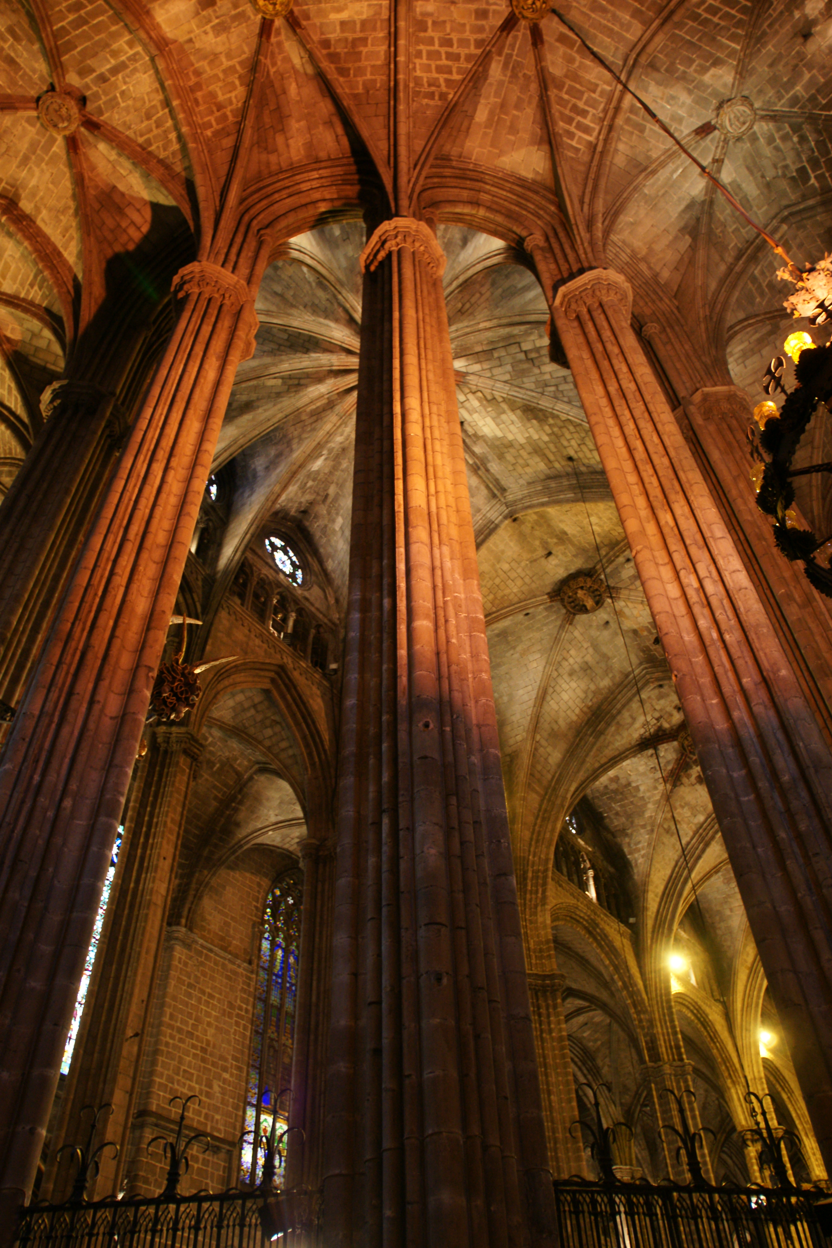 La Catedral ist eine gotische Kathedrale in Barcelona und Metropolitankirche des Erzbistums Barcelona. Sie befindet sich am Platz Pla de la Seu im Stadtviertel Barri Gòtic und ist der Heiligen Eulalia geweiht.